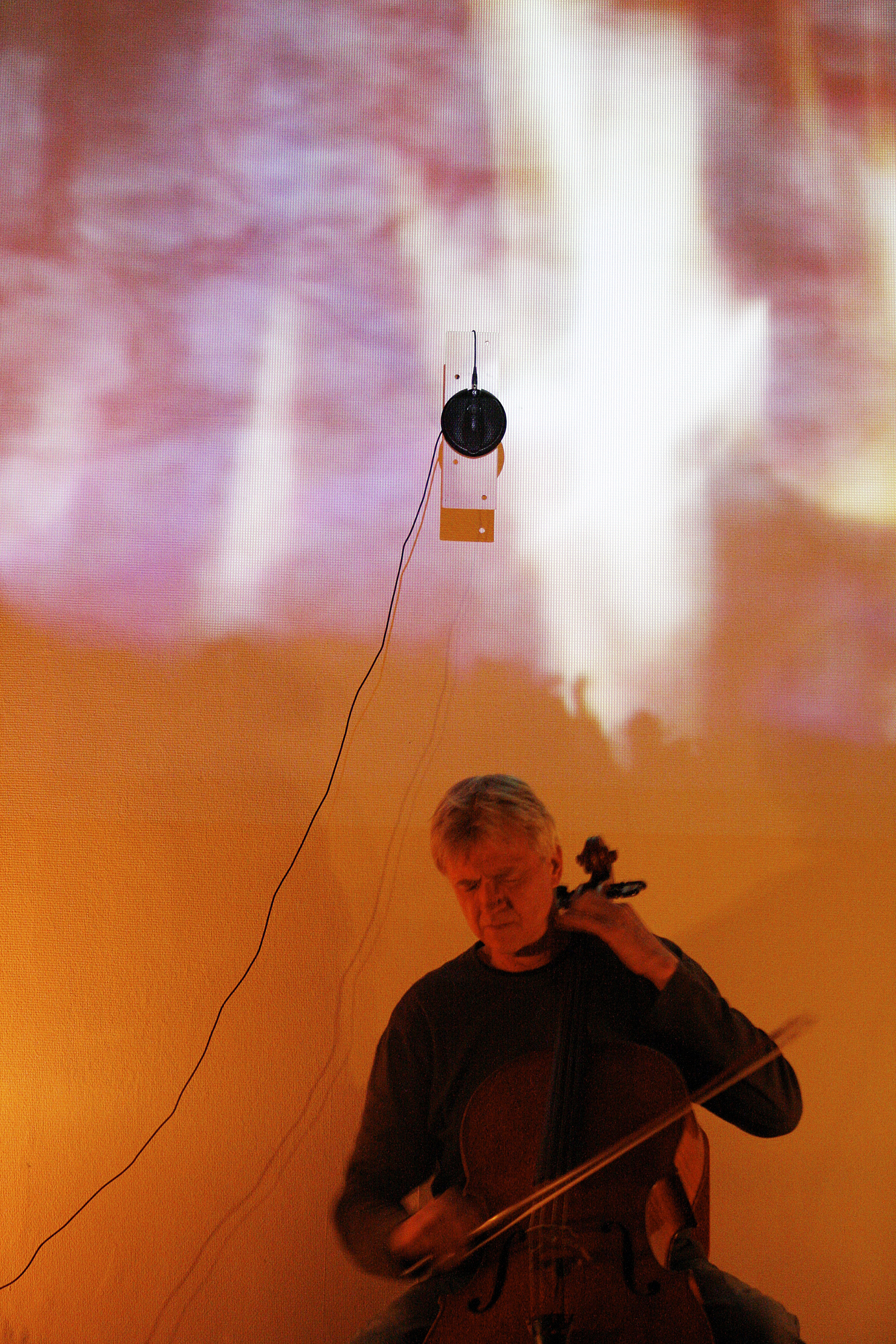 2008 - Cello-Klangperformance in der Galerie p-40, Hamburg, am 29.3.2008, unter der Projektion eigener Videos, Fotografie von Dieter Gerschler